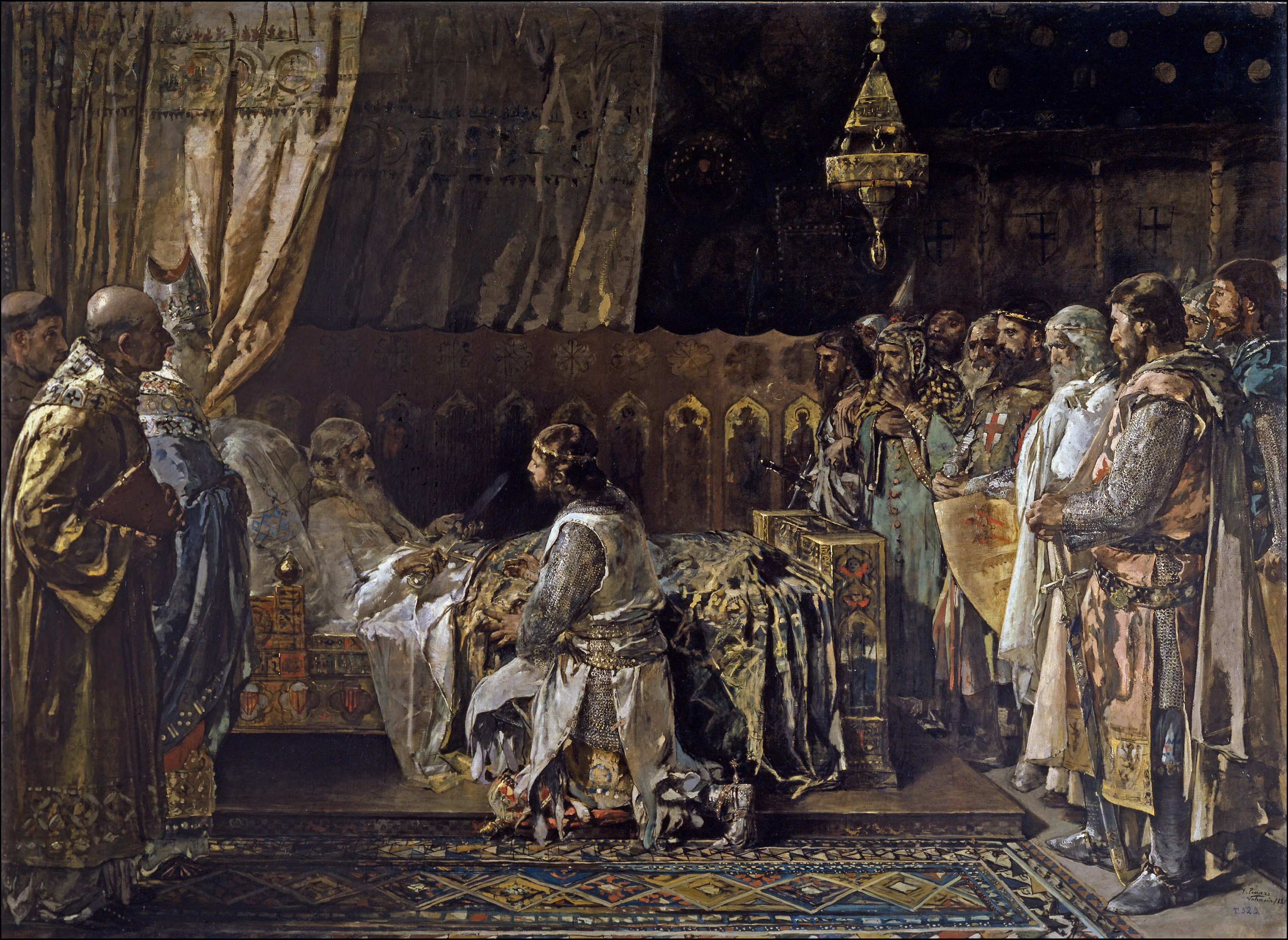 El lienzo representa al rey Jaime I de Aragón (1208-1276), en su lecho de muerte y entregando su espada a su hijo y heredero, el infante Pedro, que reinaría como Pedro III de Aragón.